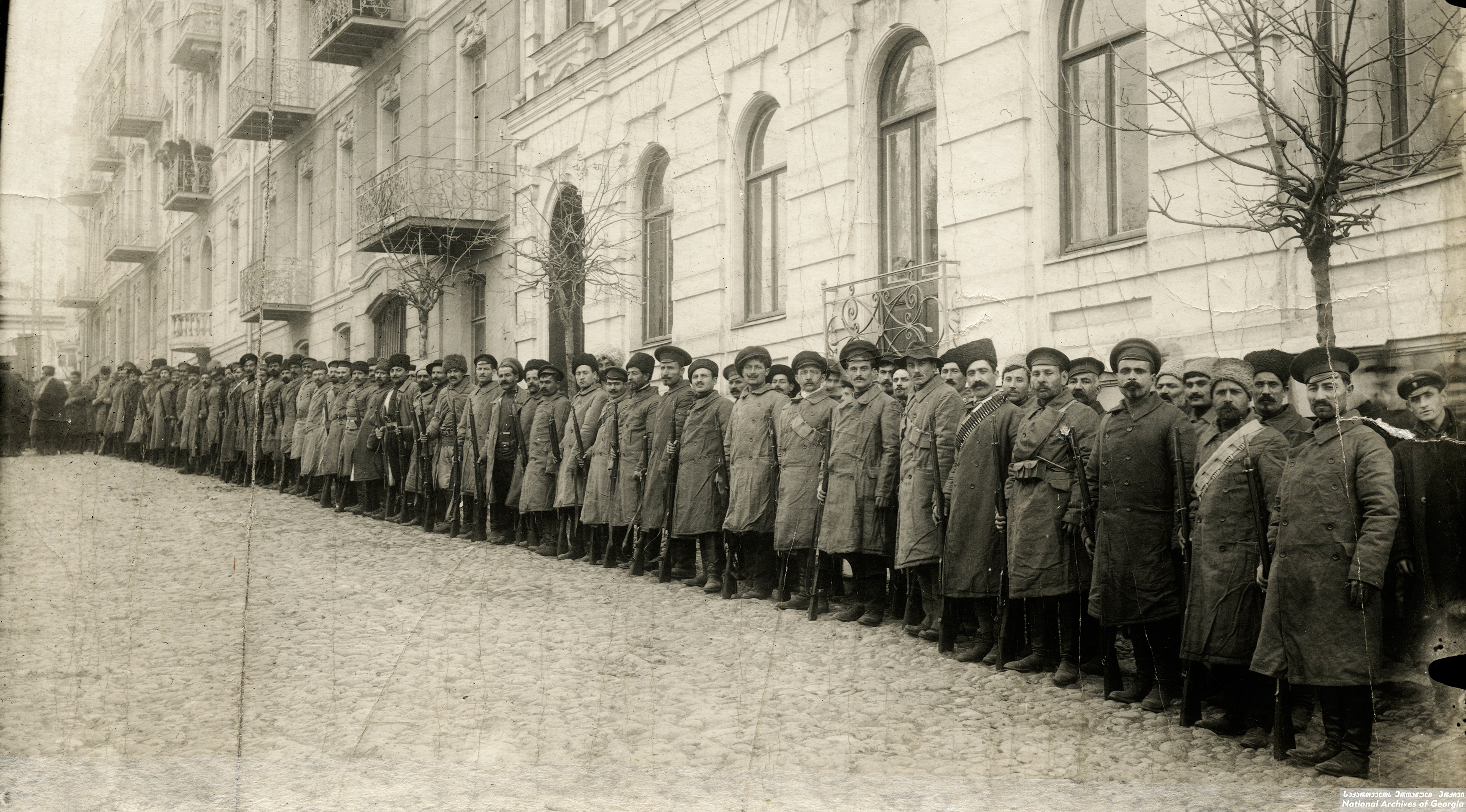 უსაფრთხოების კომისიის საგანგებო რაზმი. 1917 წ. 12 დეკემბერი. ეროვნული არქივი